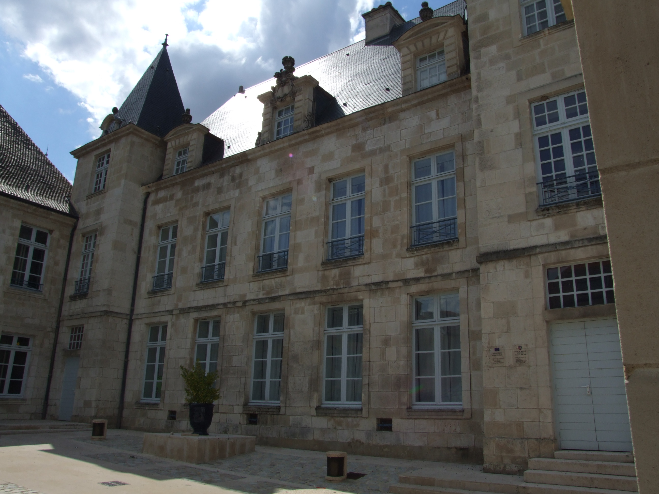 Bar-sur-Aube, Aube, Champagne-Ardennes, FRANCE